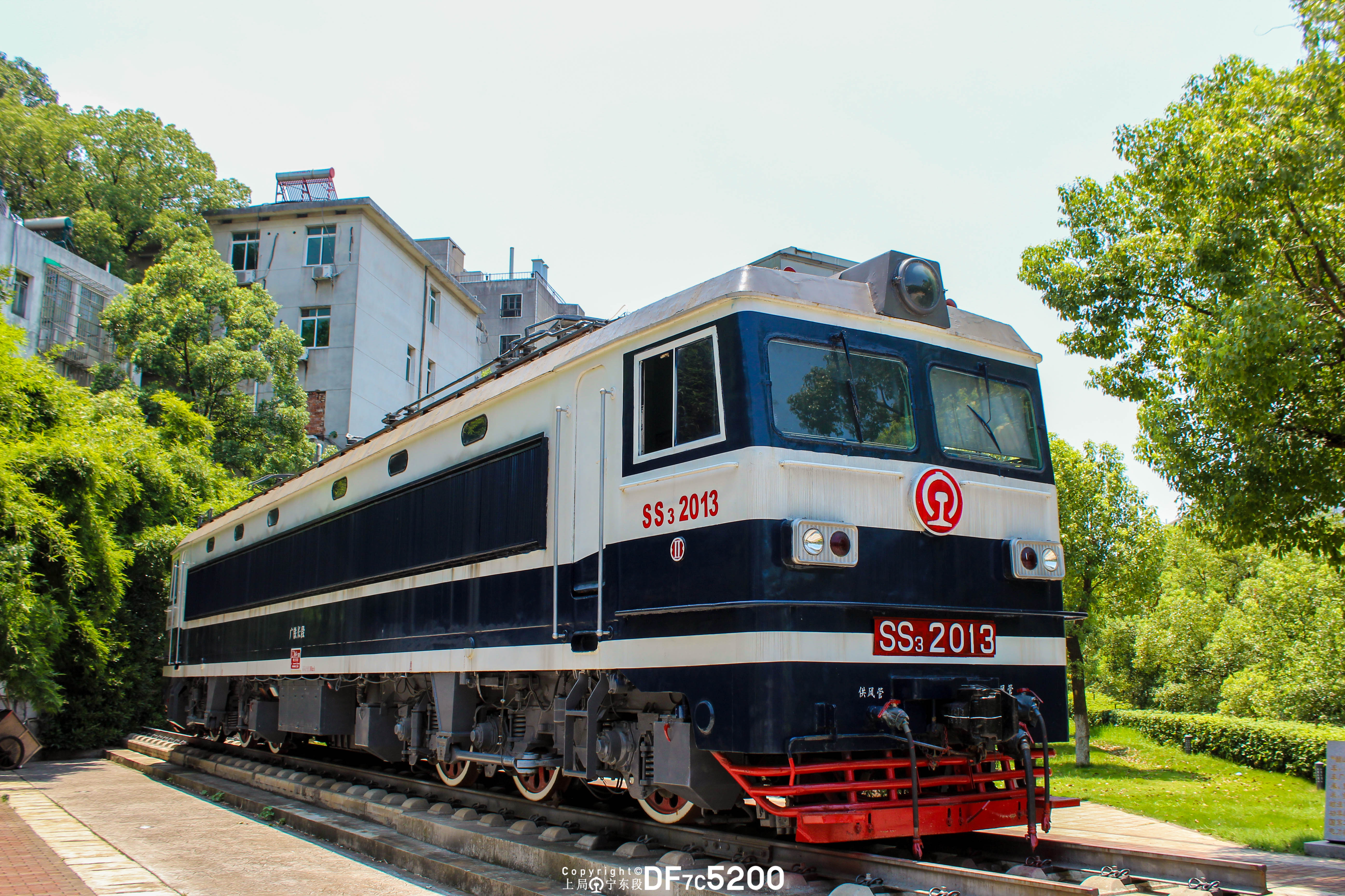 SS3_2013 in Central South University